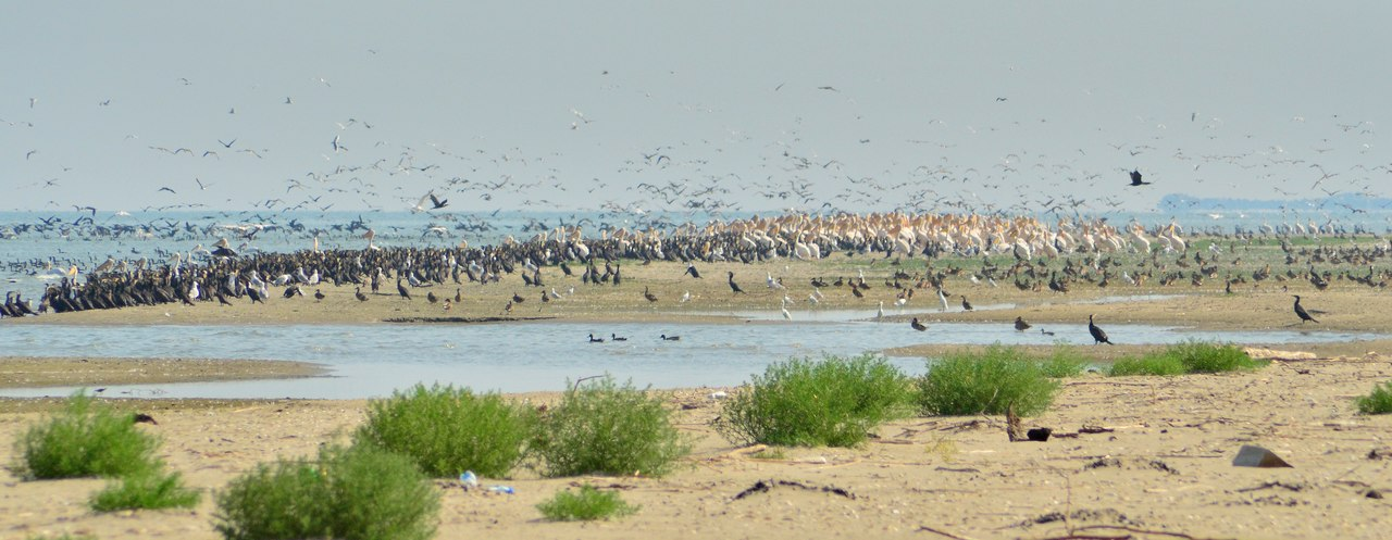 Дунайський біосферний заповідник, Кілійський р-н, м. Вилкове, вул. Татарбунарського повстання, 132 а